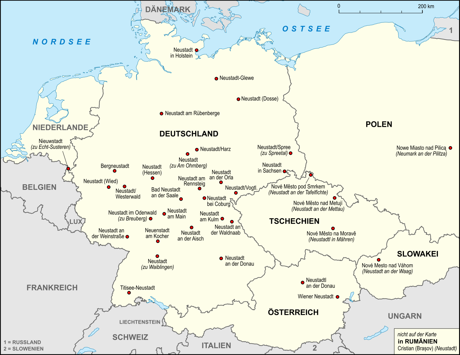 Mitgliedsstädte der Arbeitsgemeinschaft Neustadt in Europa